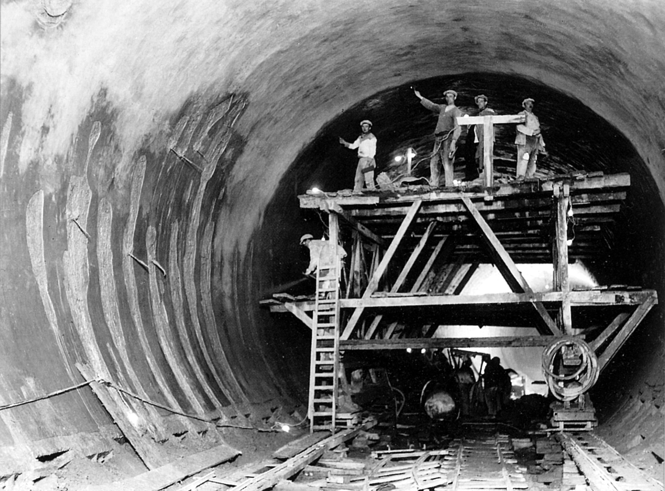 Travaux de la ligne 7 du métro de Paris, France. Bétonnage des voussoirs de la traversée sous-fluviale.